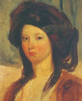 Actress Juliette Drouet as princesse Negroni (ca. 1827) [1].